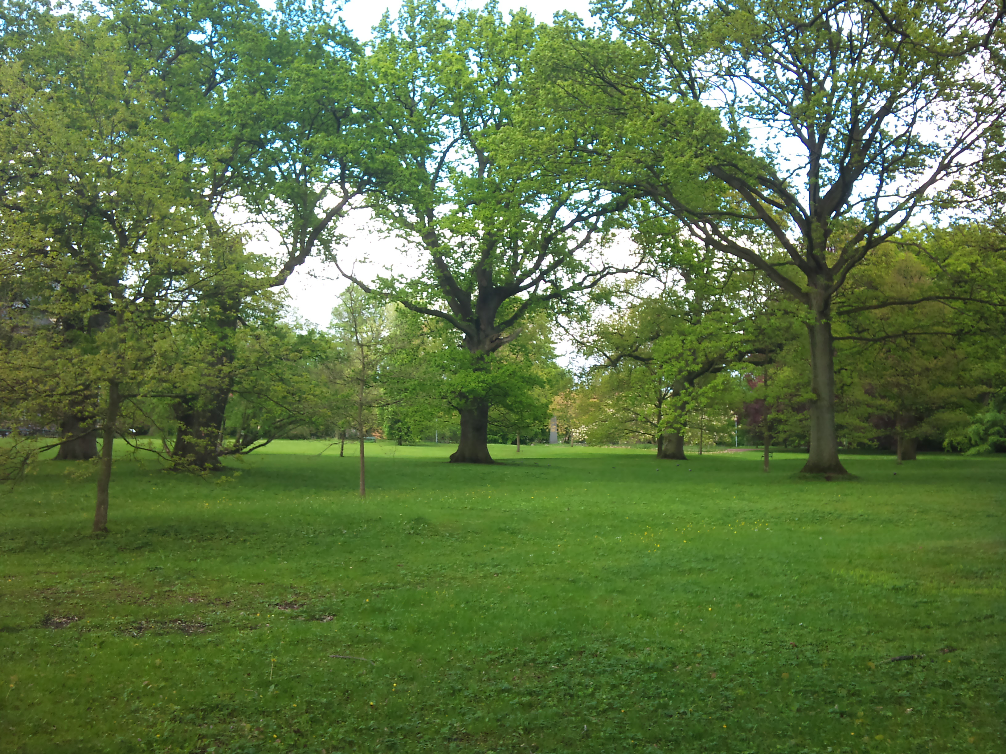 Del av Alnarpsparken